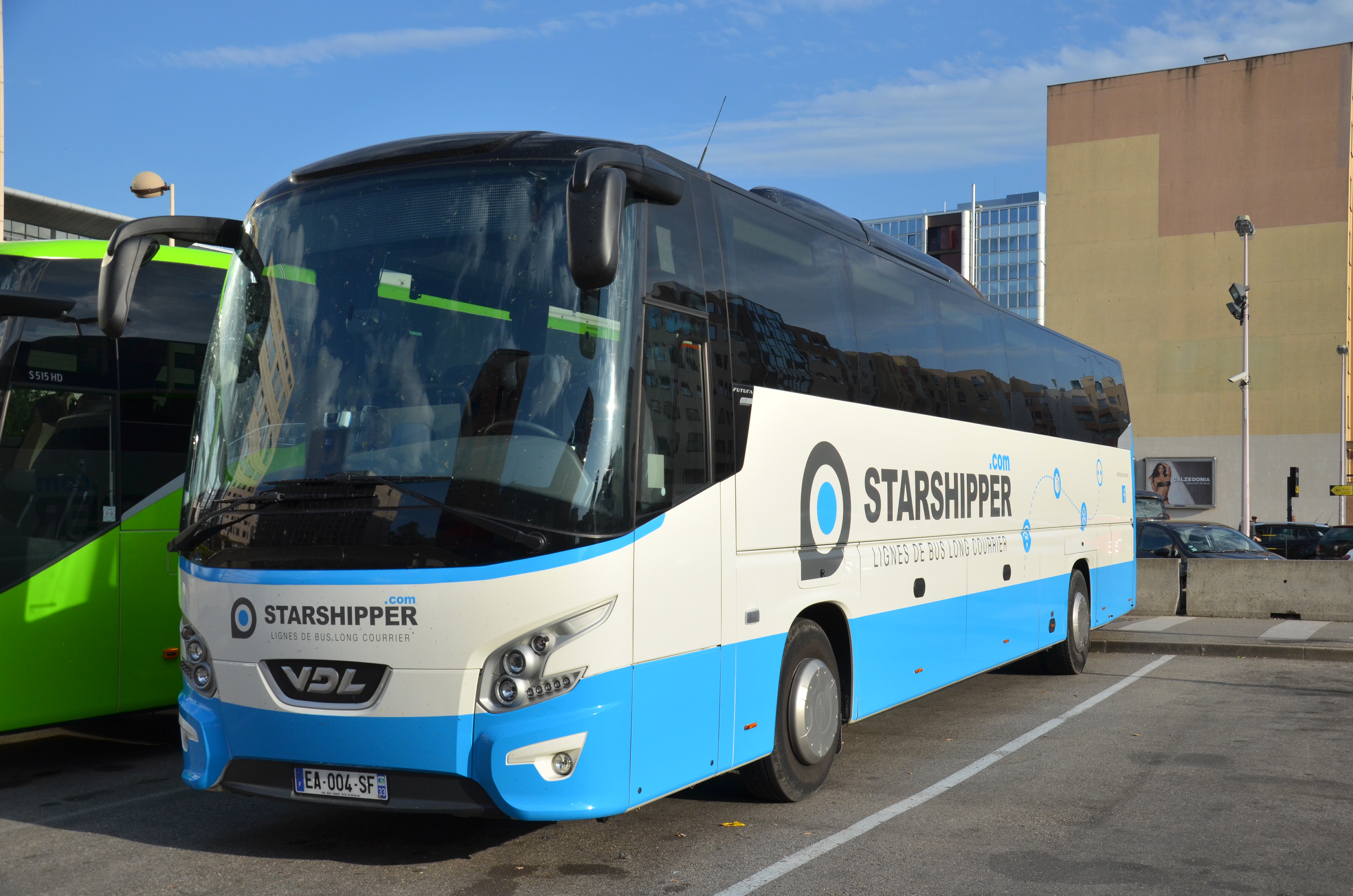 Autocar VDL Futura de Starshipper, à la gare routière de Lyon Part-Dieu Villette.